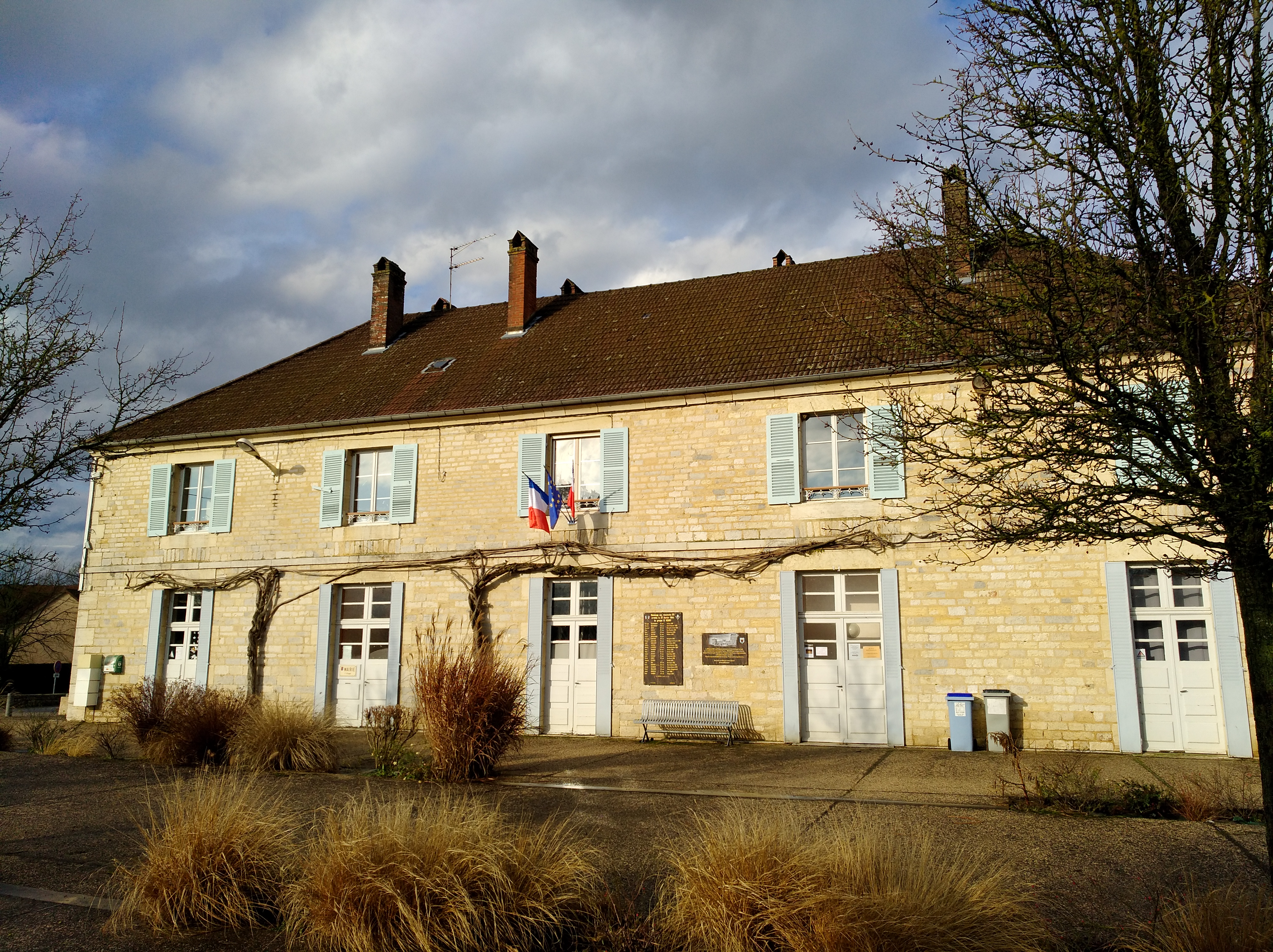 Vaudrey (Jura, France) en janvier 2018.